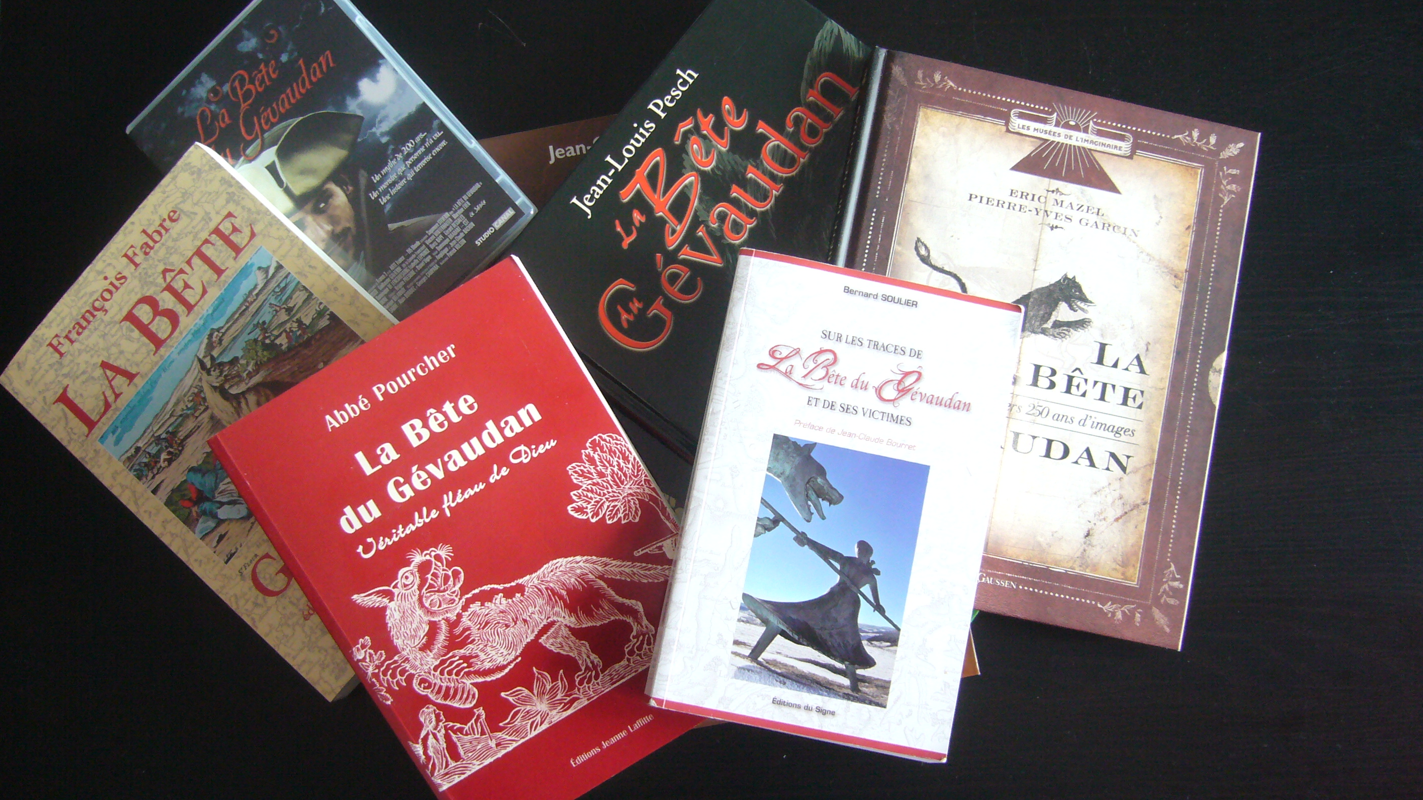 Divers ouvrages (français) sur la Bête du Gévaudan